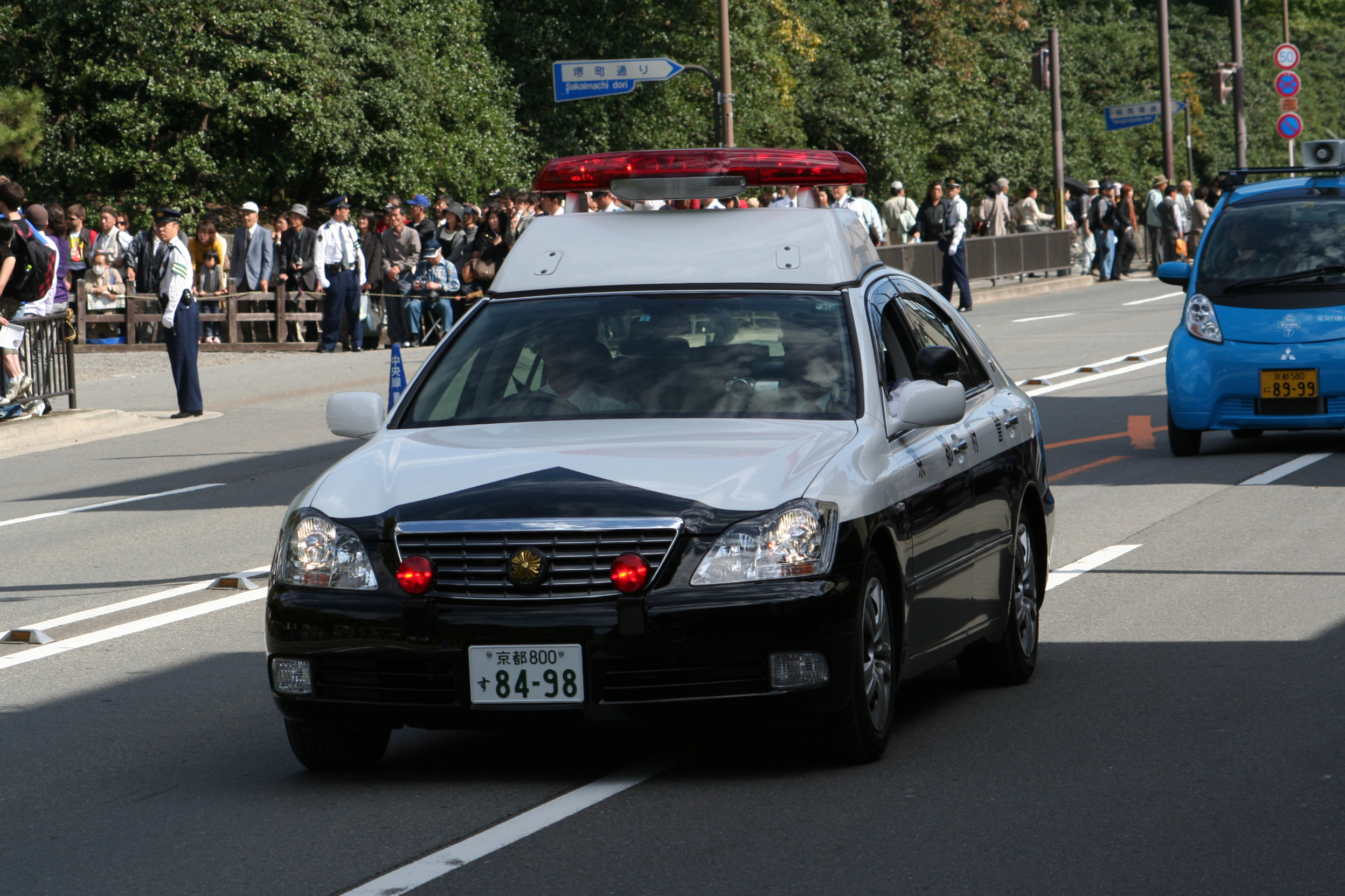 京都府京都市にて開催された時代祭。正午の御所から平安神宮までの行進の様子。2009年10月22日撮影。 行列を先導するパトカー。